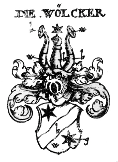 Wappen der Nürnberger Adels- und Patrizierfamilie Woelckern / Wölckern auf Kalchreuth (17. Jahrhundert "Ehrbar" - 1728 vom Kaiser geadelt - Patrizier ab 1788 - erloschen 1905)